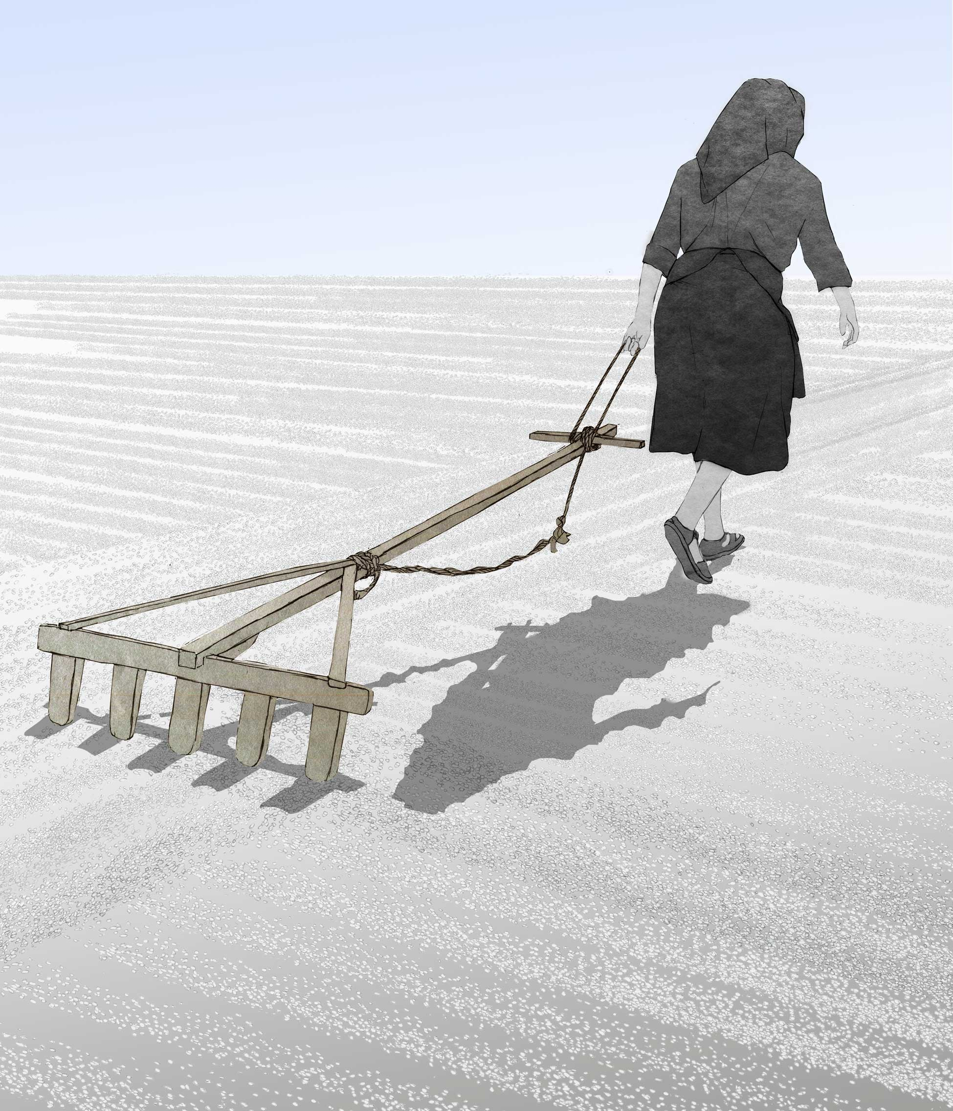 Sequer en un camp d'arròs